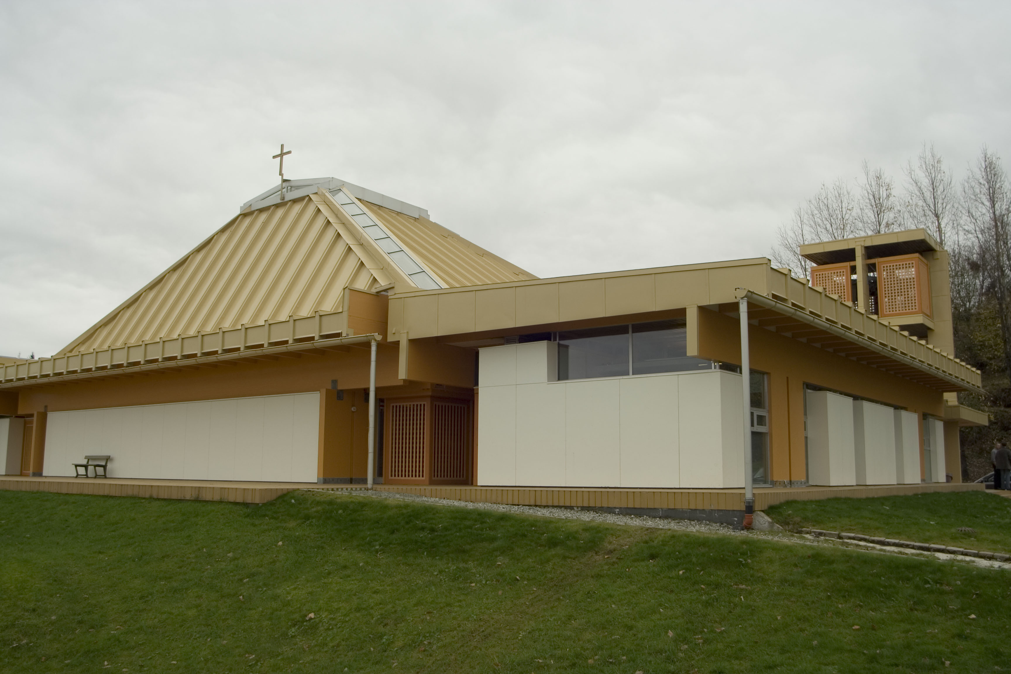 Søreide church, Hordaland, Norway